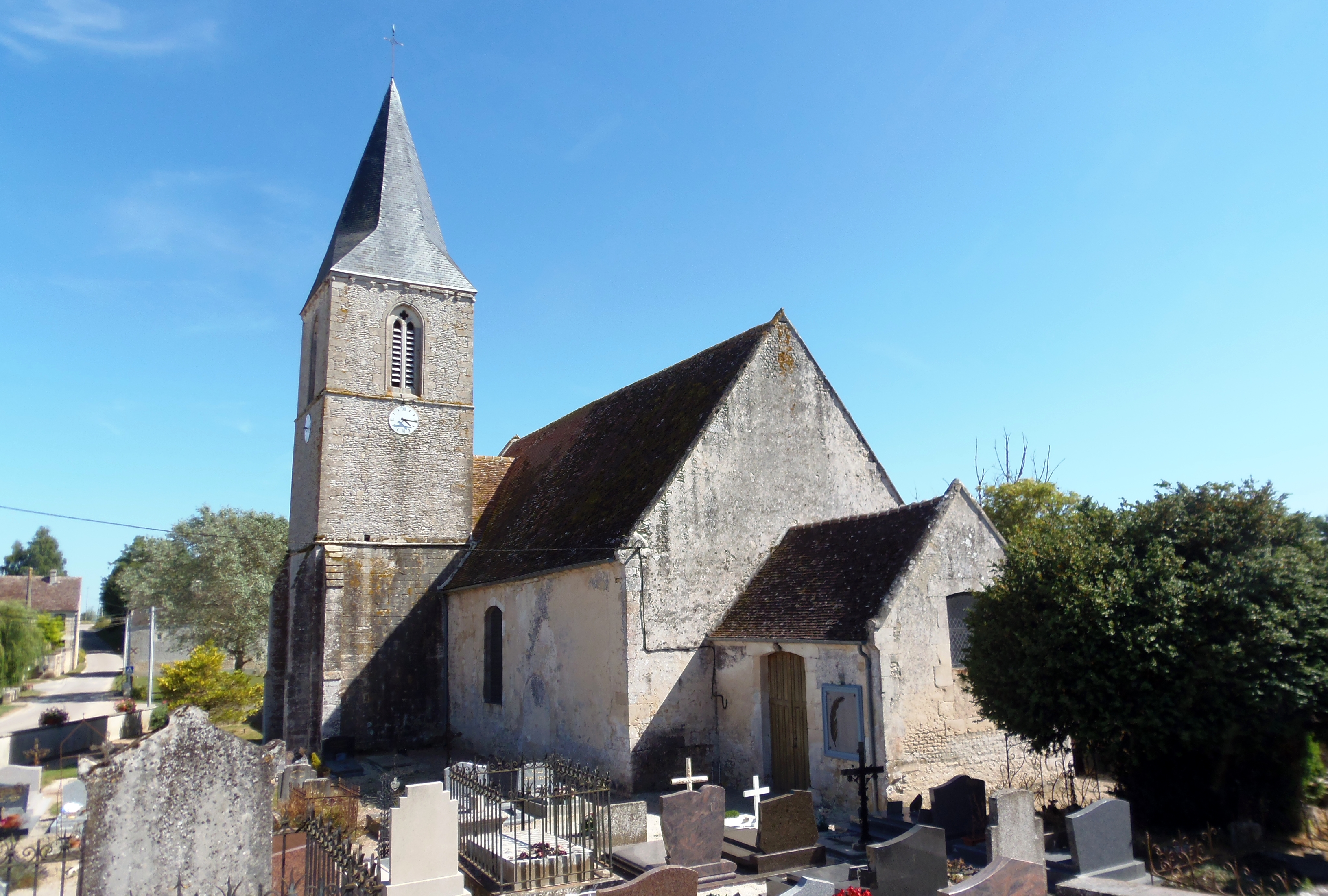 Fontaine-les-Bassets (Normandie, France). L'église Saint-Rémi.